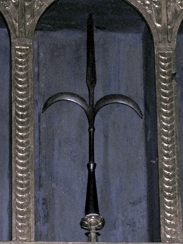 Questa è l'alabarda originale conservata nel tesoro della Cattedrale di S. Giusto